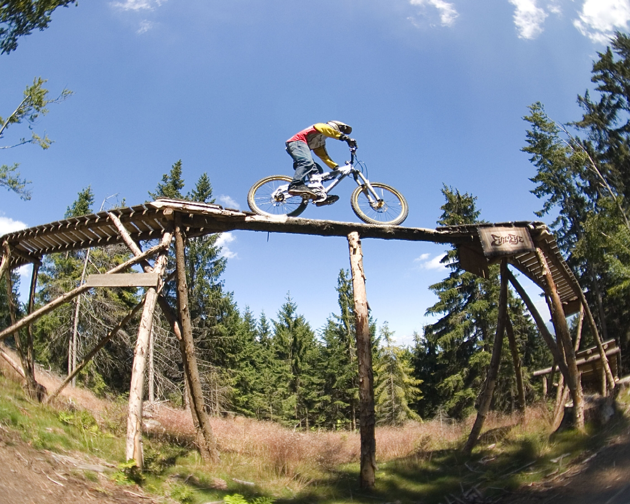 North Shore im bayrischen Bischofsmais